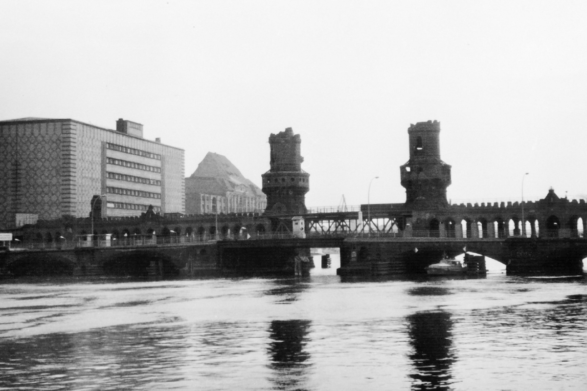 Oberbaumbrücke between East and West Berlin on 1966-04-14